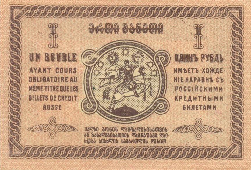 1 maneti